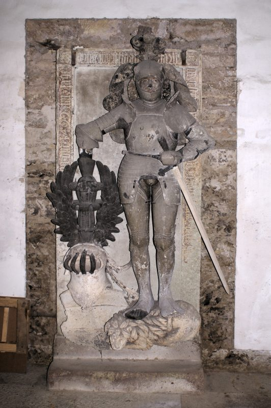 Ritter Dietrich von Harras auf einem Epitaph , vermutlich von Hans Witten, in der Stiftskirche Ebersdorf (Chemnitz)